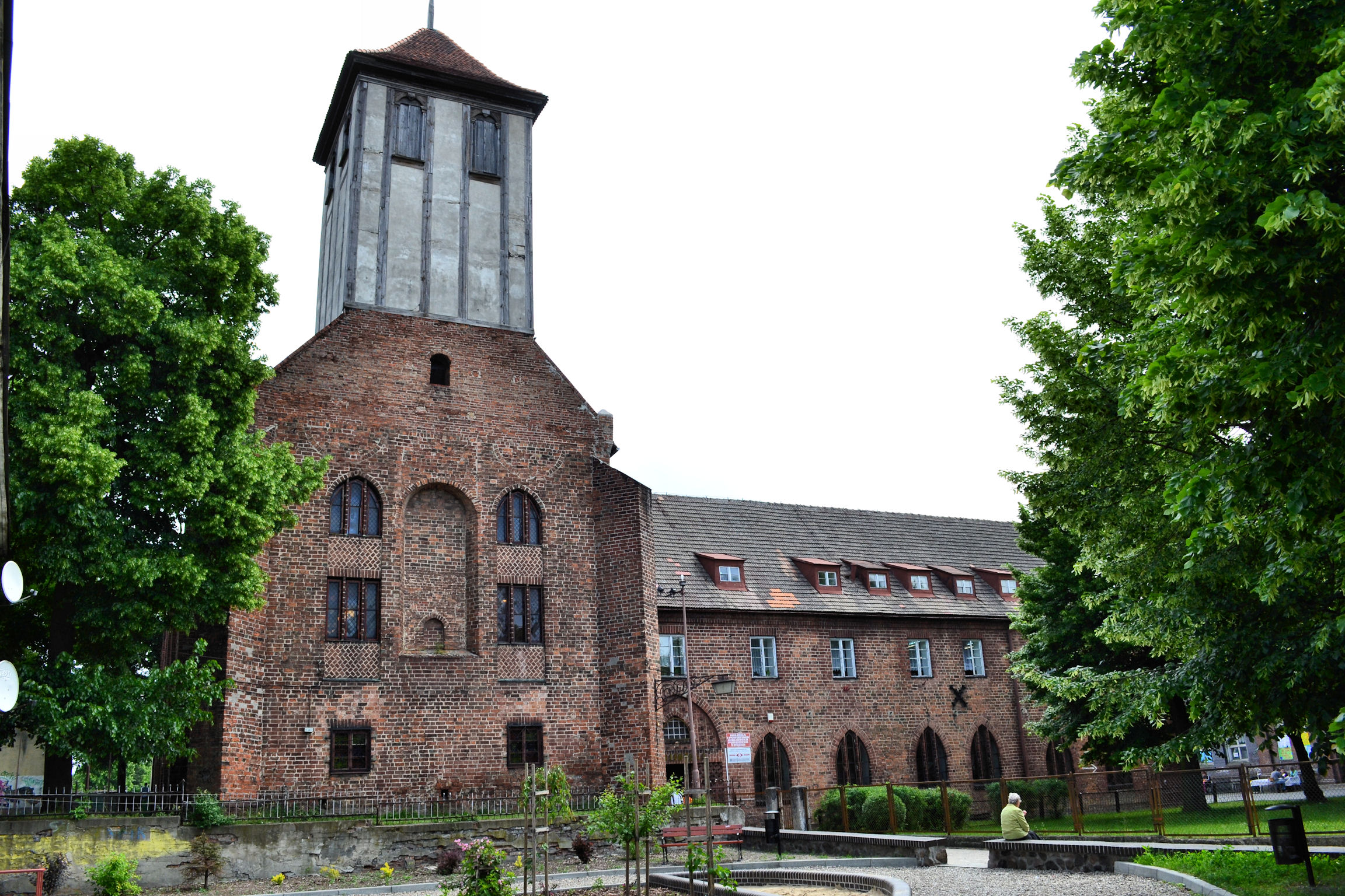 dawny klasztor dominikanów w Myśliborzu